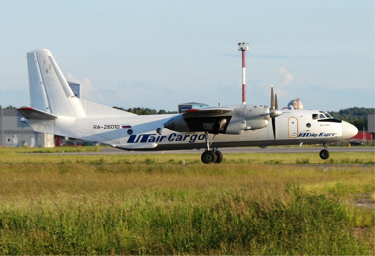 RA-26010, UTair Cargo Antonov An-26, Pulkovo Airport